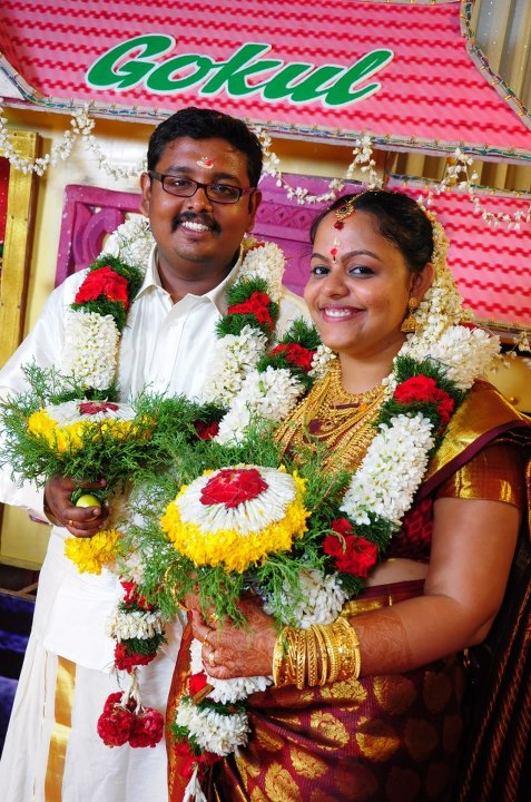 Hindu marriage